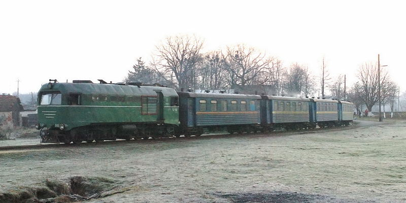 TU2-066 in Antoniwka